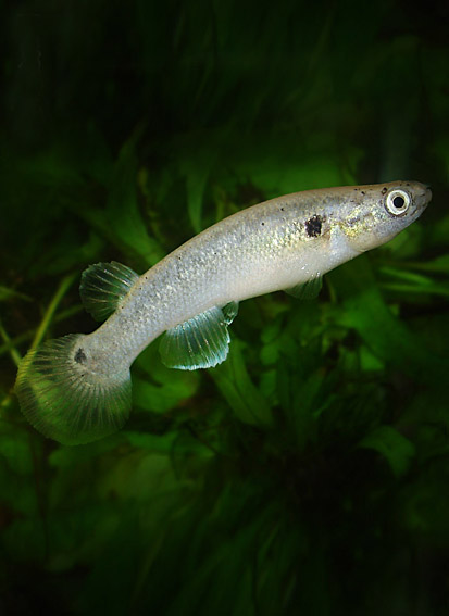 Kryptolebias ocellatus